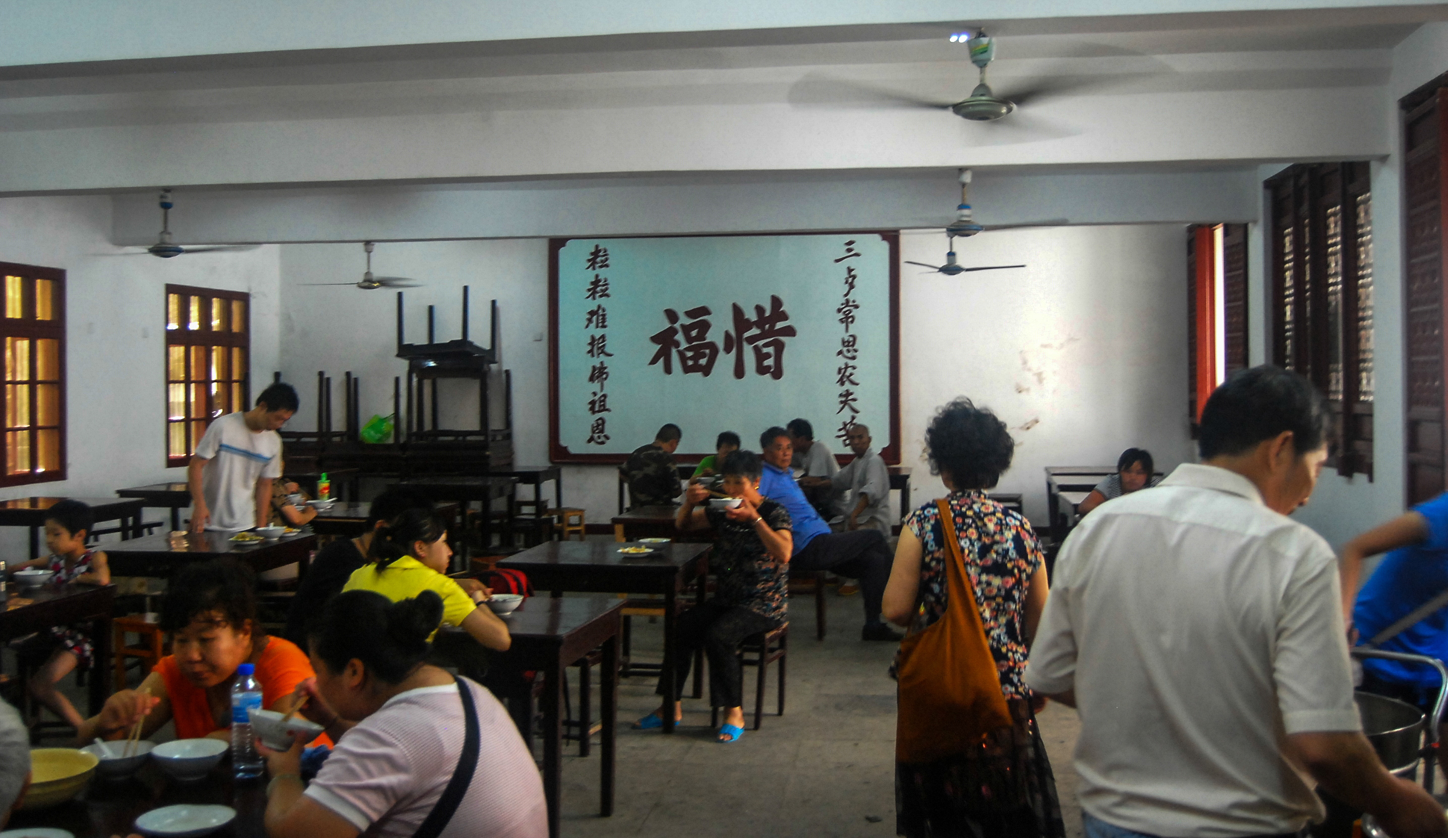 中文（中国大陆）: 普陀山惠济寺内饭堂